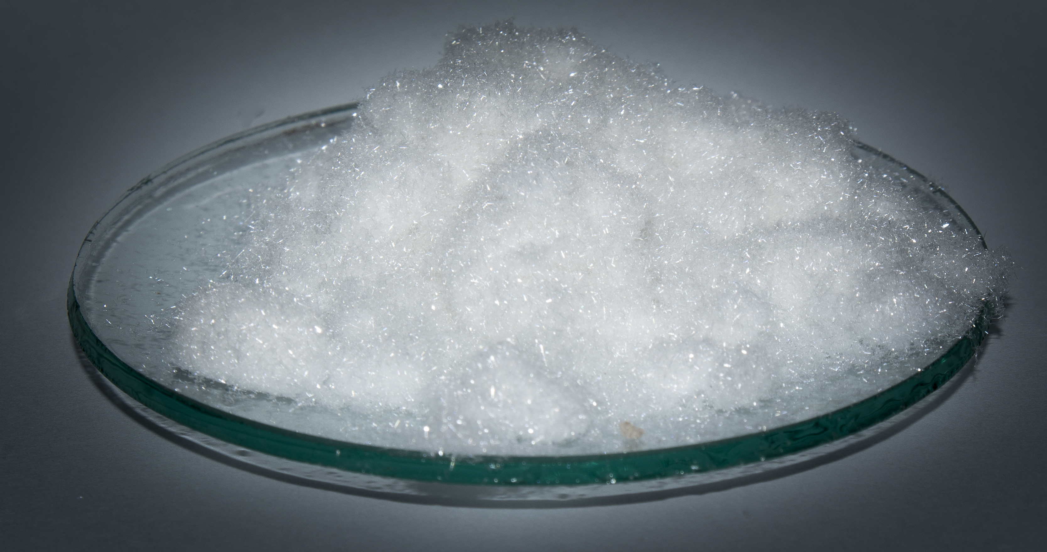 Kryształki kwasu salicylowego.